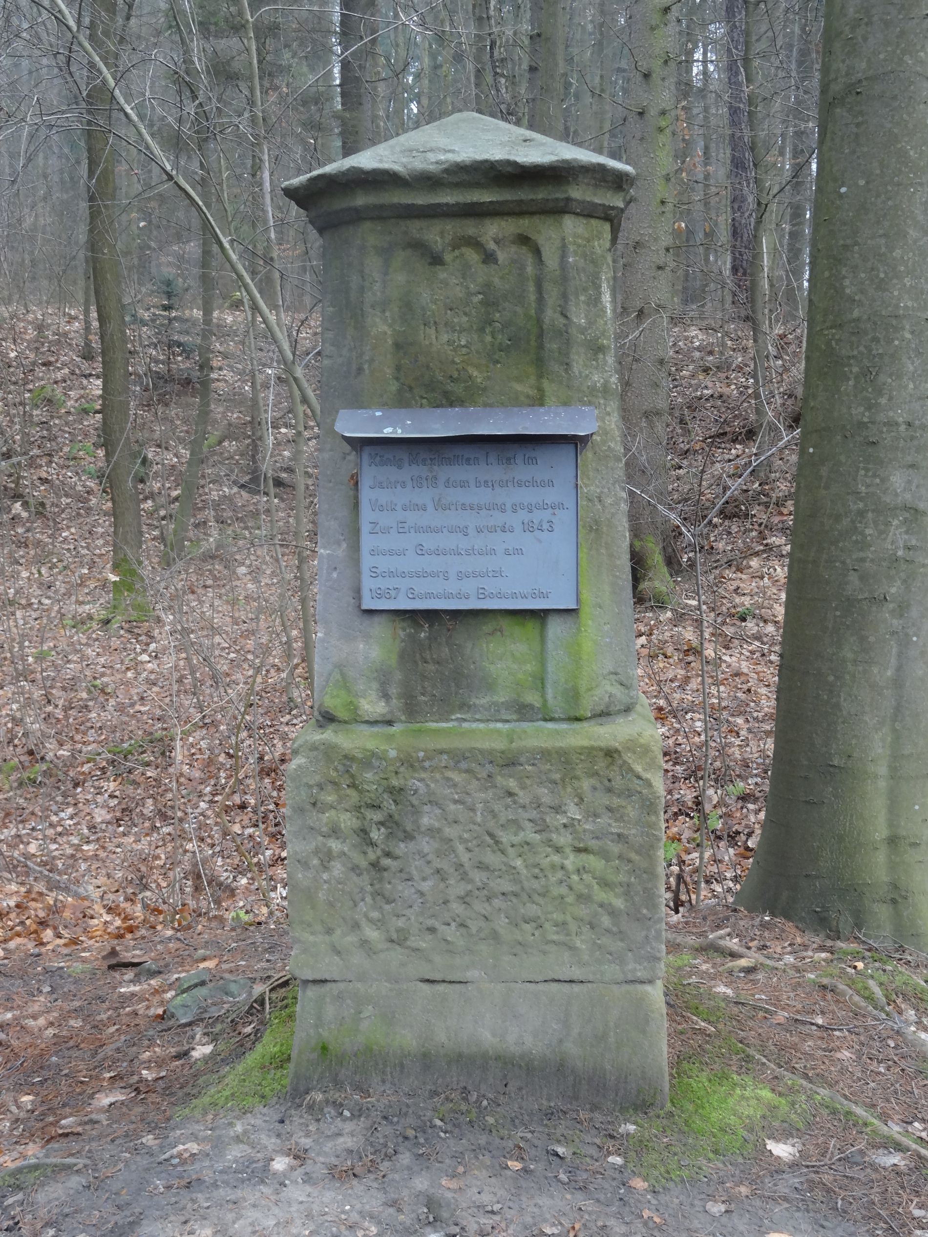 Gedenkstein zur Erinnerung an die bayerische Verfassungsgebung von 1818, errichtet 1843; am Hammersee-Rundweg